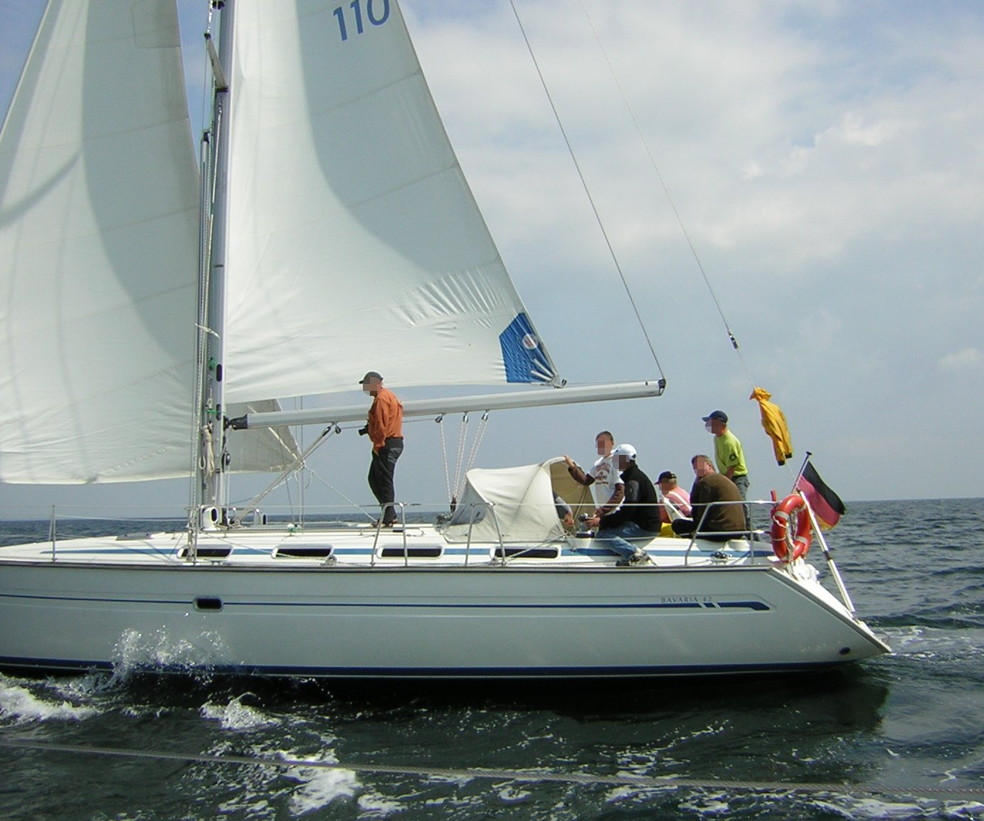 Bavaria 42